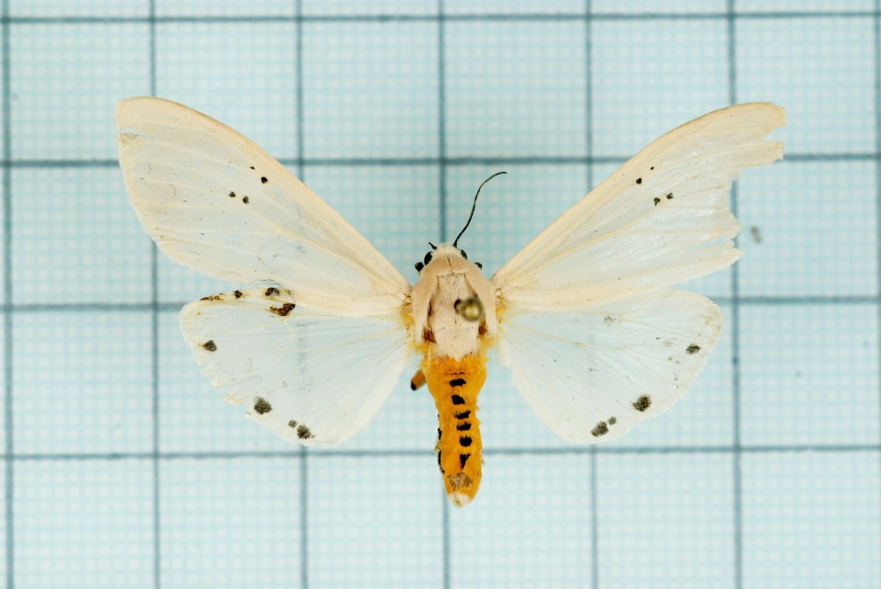 Creatonotos transiens vacillans Walker,1855 灰白燈蛾 認識台灣的昆蟲 7 燈蛾科 P48 female